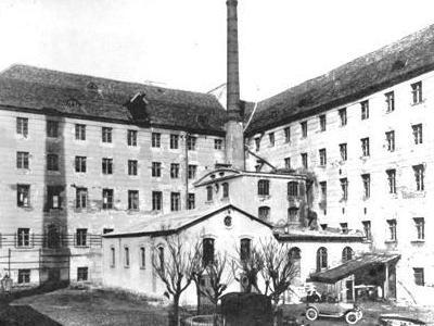 Opatówek, Poland, fabryka Adolfa Bogusława Fiedlera